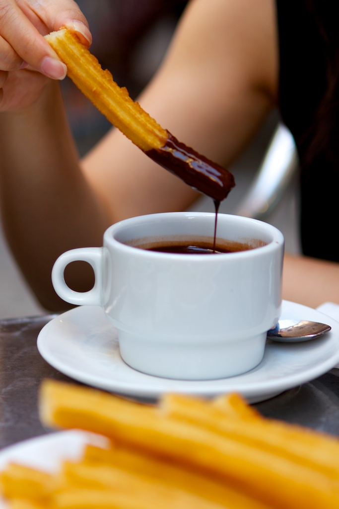 Chocolate con churros, en una chocolatería de Madrid.